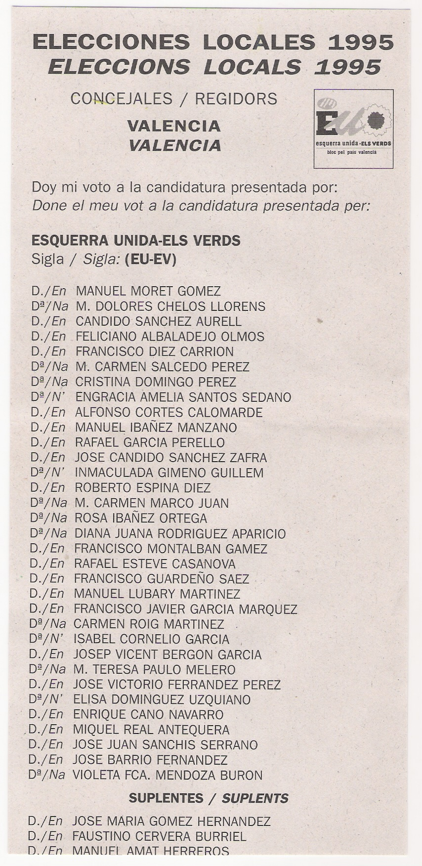 Papeleta electoral de Esquerra Unida - Els Verds. Elecciones locales de 1995. Municipio de Valencia.